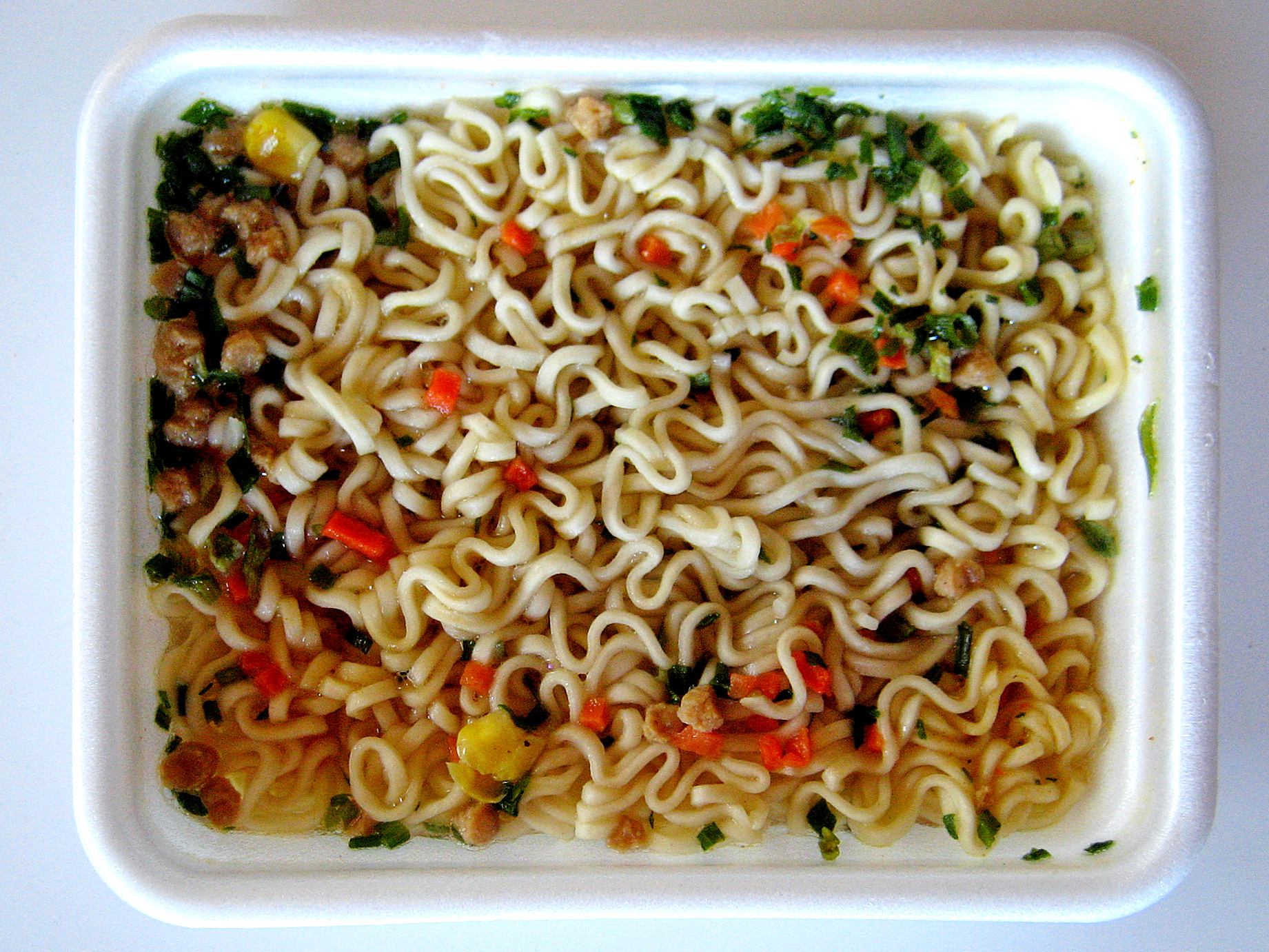 РОЛЛТОН. Куриная лапша по-домашнему. Острая.. Фото А. Щекинова. «Роллтон» — торговая марка пищевых продуктов, представленная на территории России, стран СНГ, стран ЕС, Африки и Азии. Производится дочерними предприятиями холдинга Mareven Food Holdings — компаниями ООО «Маревен Фуд Сэнтрал» (Россия), ООО «Маревен Фуд Украина» (Украина), ТОО «Маревен Фуд Тянь-Шань» (Казахстан).